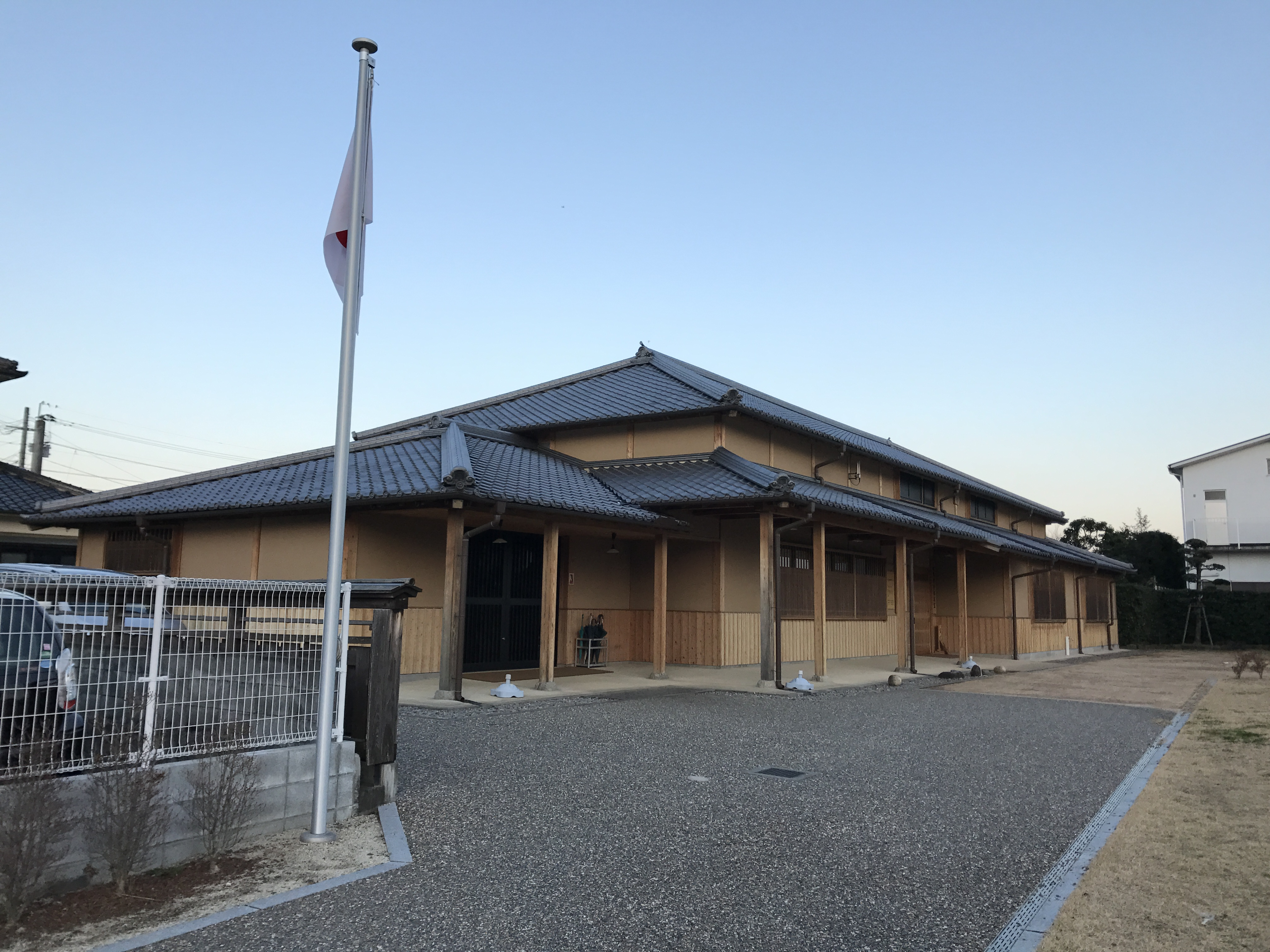 咸宜園教育研究センター